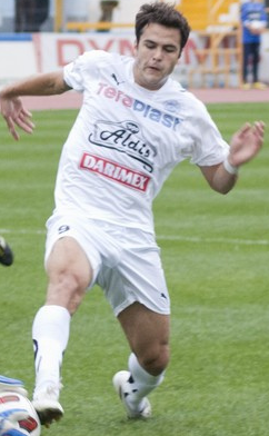 Imagine din meciul Gloria Bistrita - FC Brasov (0-0)